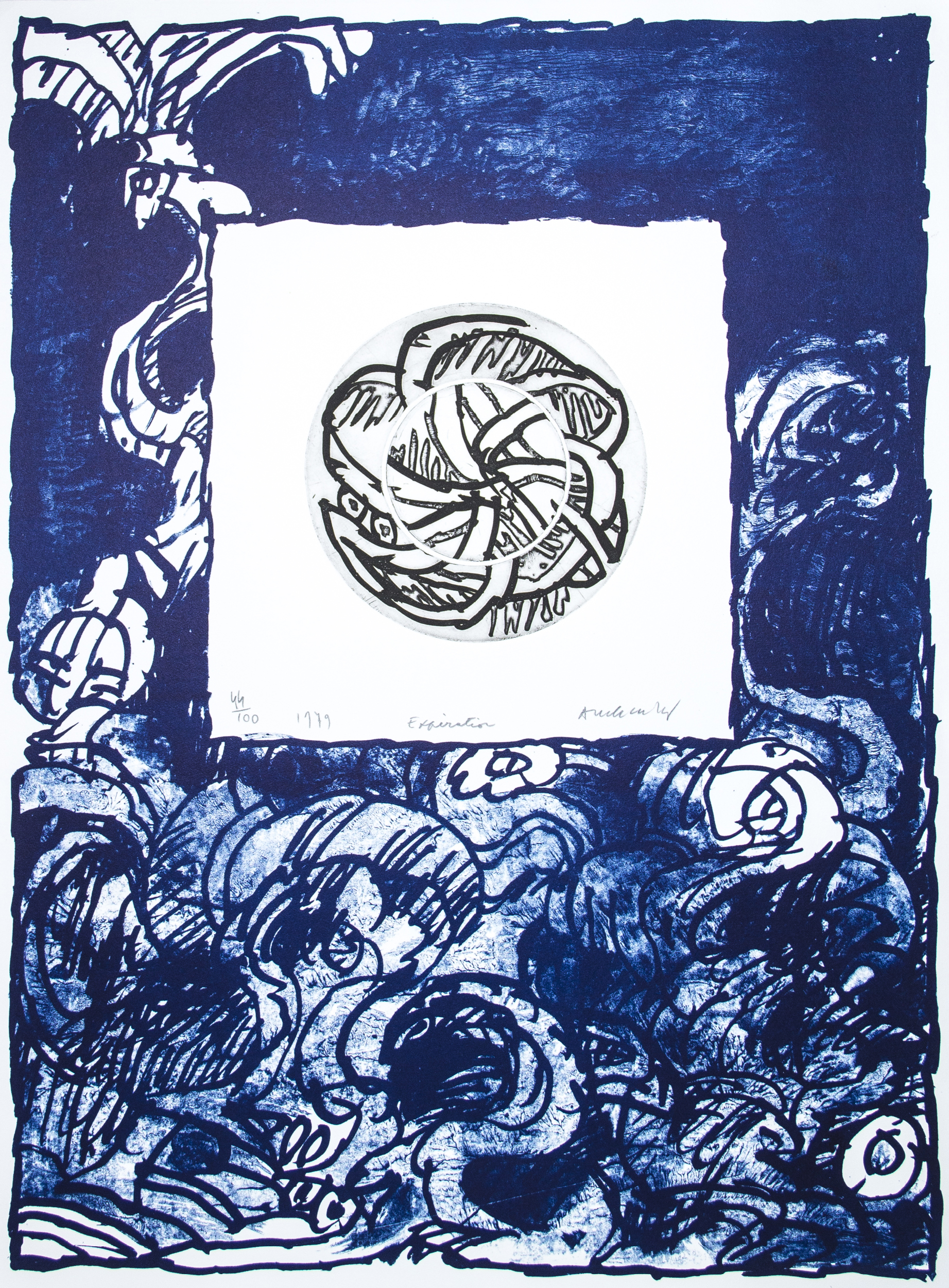 Kleuren litho-ets. Nr. 44/100. 1979. Eromheen een zeefdruk. Peter Stuyvesant Collectie Folder. Hoort bij vrm 00577. Collectie Gelderland.